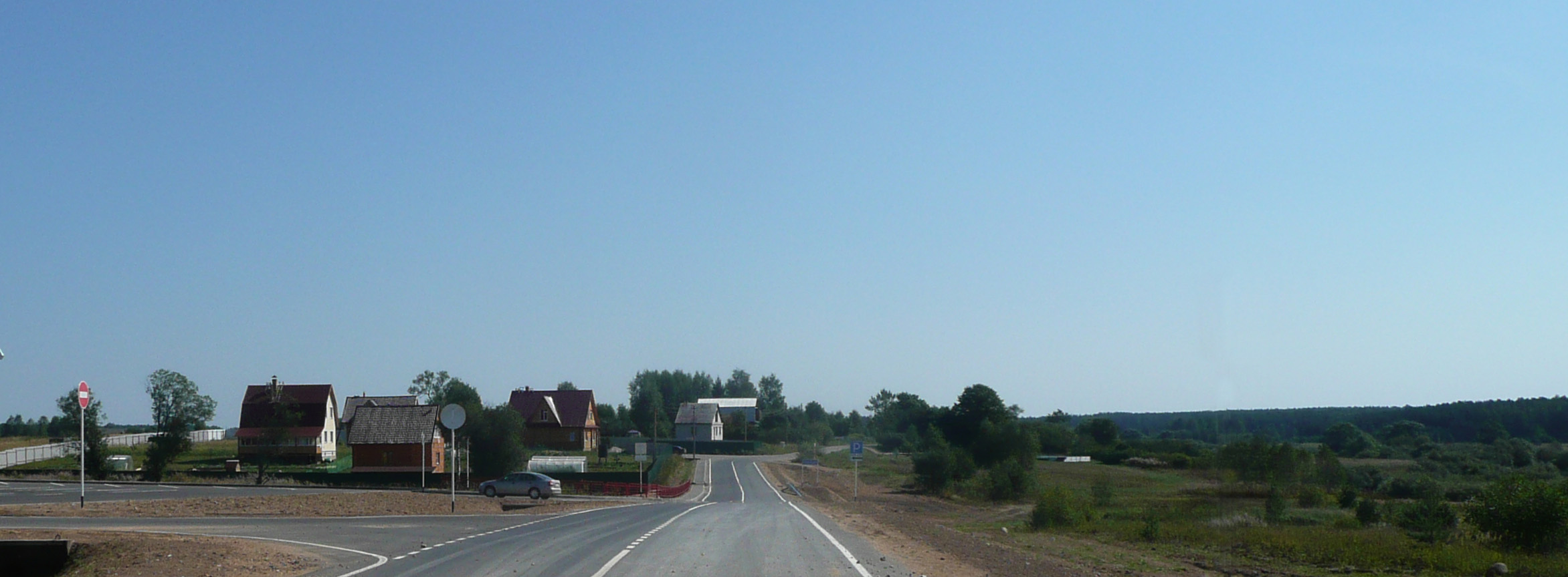 Вид д.Князево